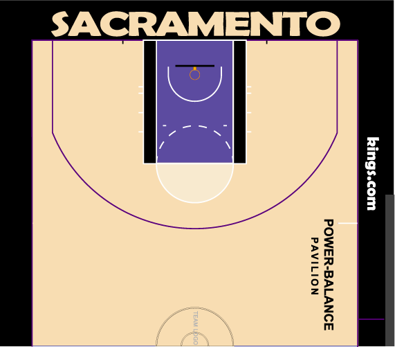 キングスホームコート配色